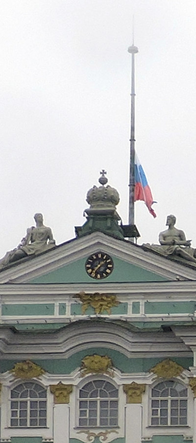 Зимний дворец 4.11.15. Из-за траура по погибшим в авиакатастрофе рейса 9268 приспущен государственный флаг России